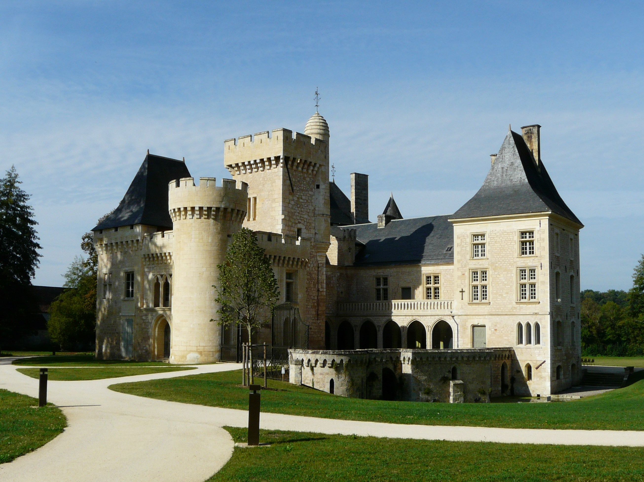 Le château de Campagne, Dordogne, France. Vue prise depuis le nord-est.